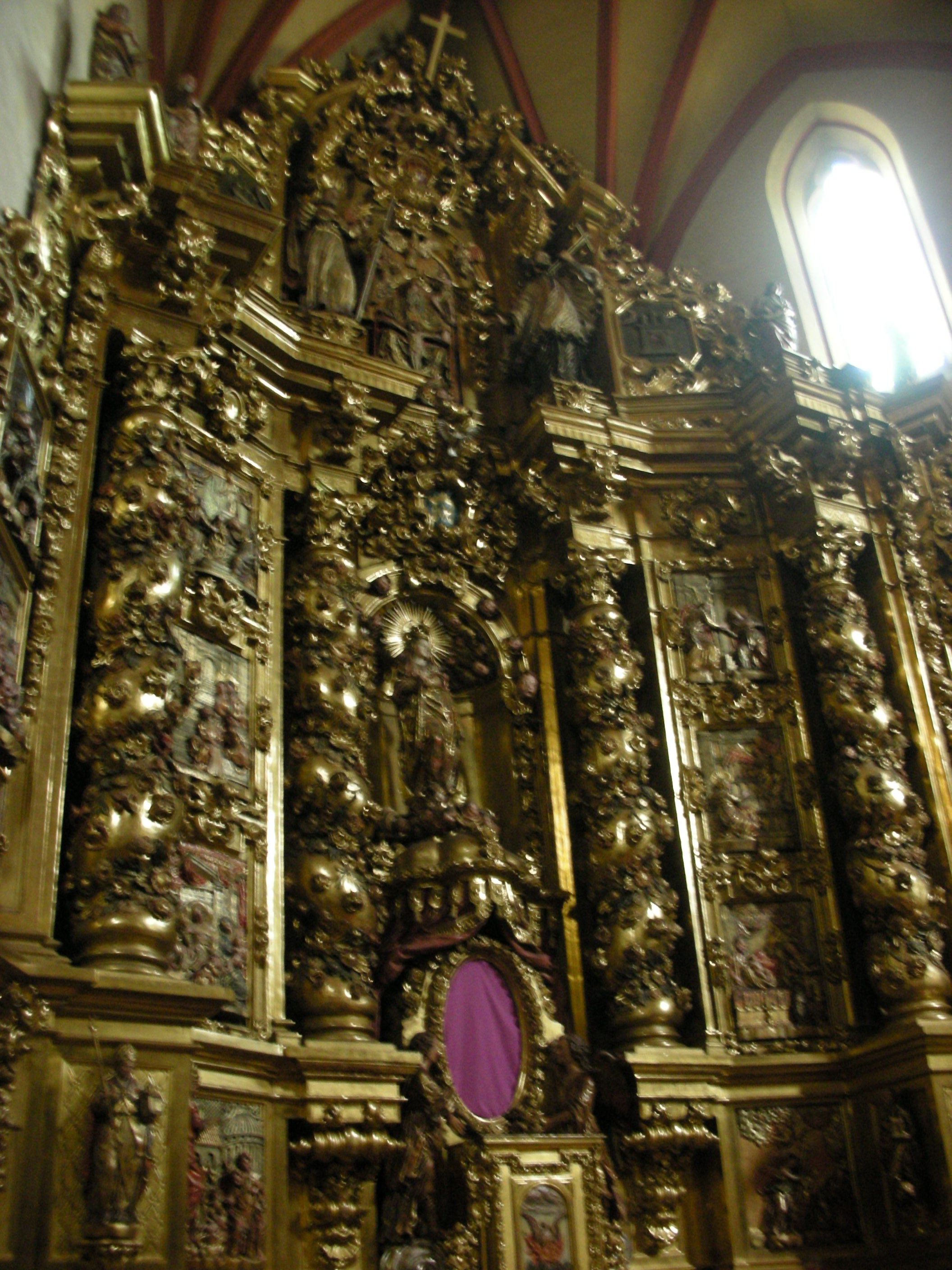 Retablo de la parroquia de la Asunción, en Lumbier, Navarra